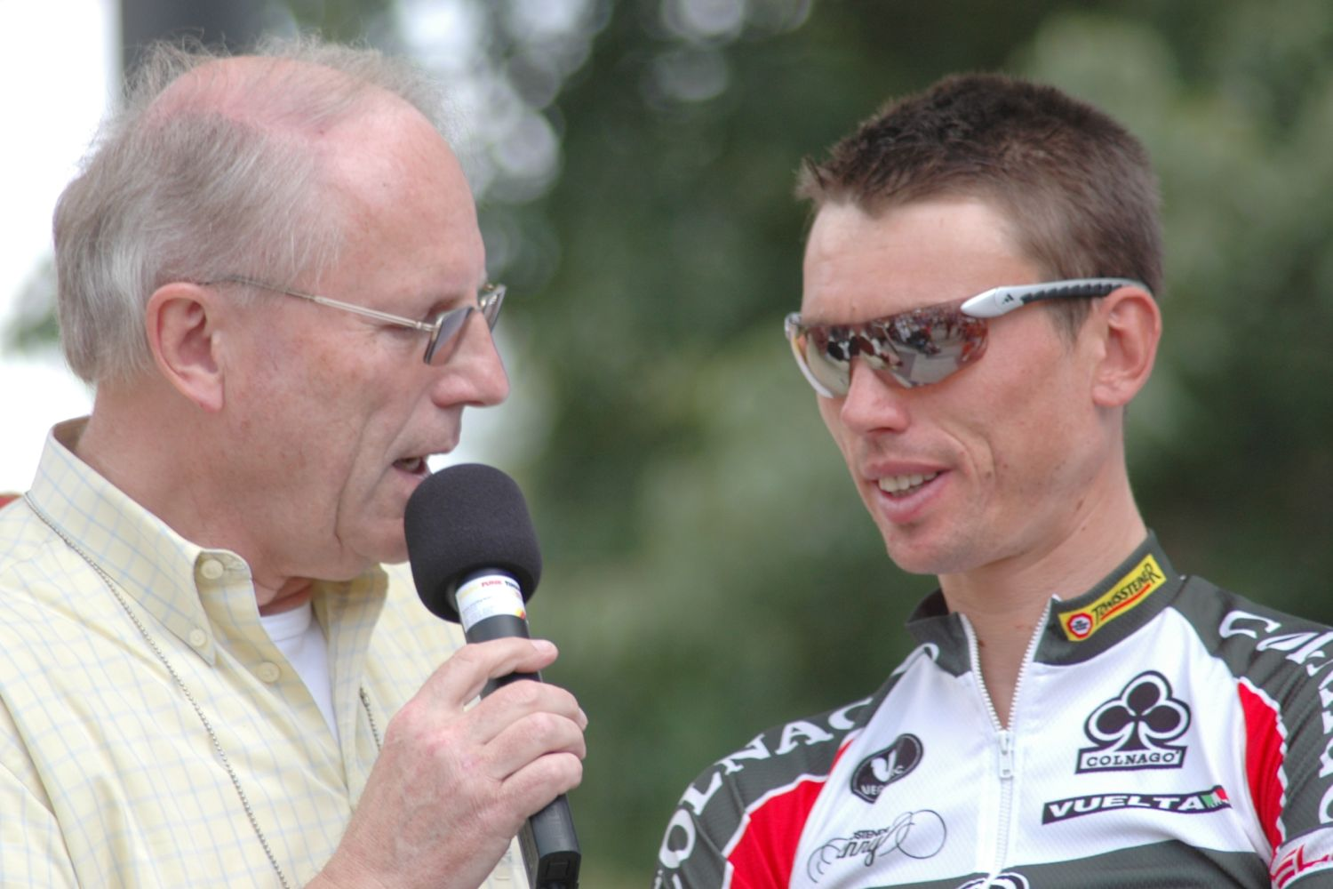 Beschreibung: Nico Sijmens (Team Landbouwkrediet-Colnago, Gesamtsieger der Rothaus Regio-Tour International 2005, im Gespräch mit Kommentator Herbert Watterott (links). Quelle: selbst fotografiert Datum: 16. August 2006 Ort: Heitersheim, Baden-Württemberg, Deutschland Fotograf oder Zeichner: Alex Alex (de) Kamera: Nikon D 70 Software: The GIMP Andere Versionen: Lizenzstatus: GNU FDL